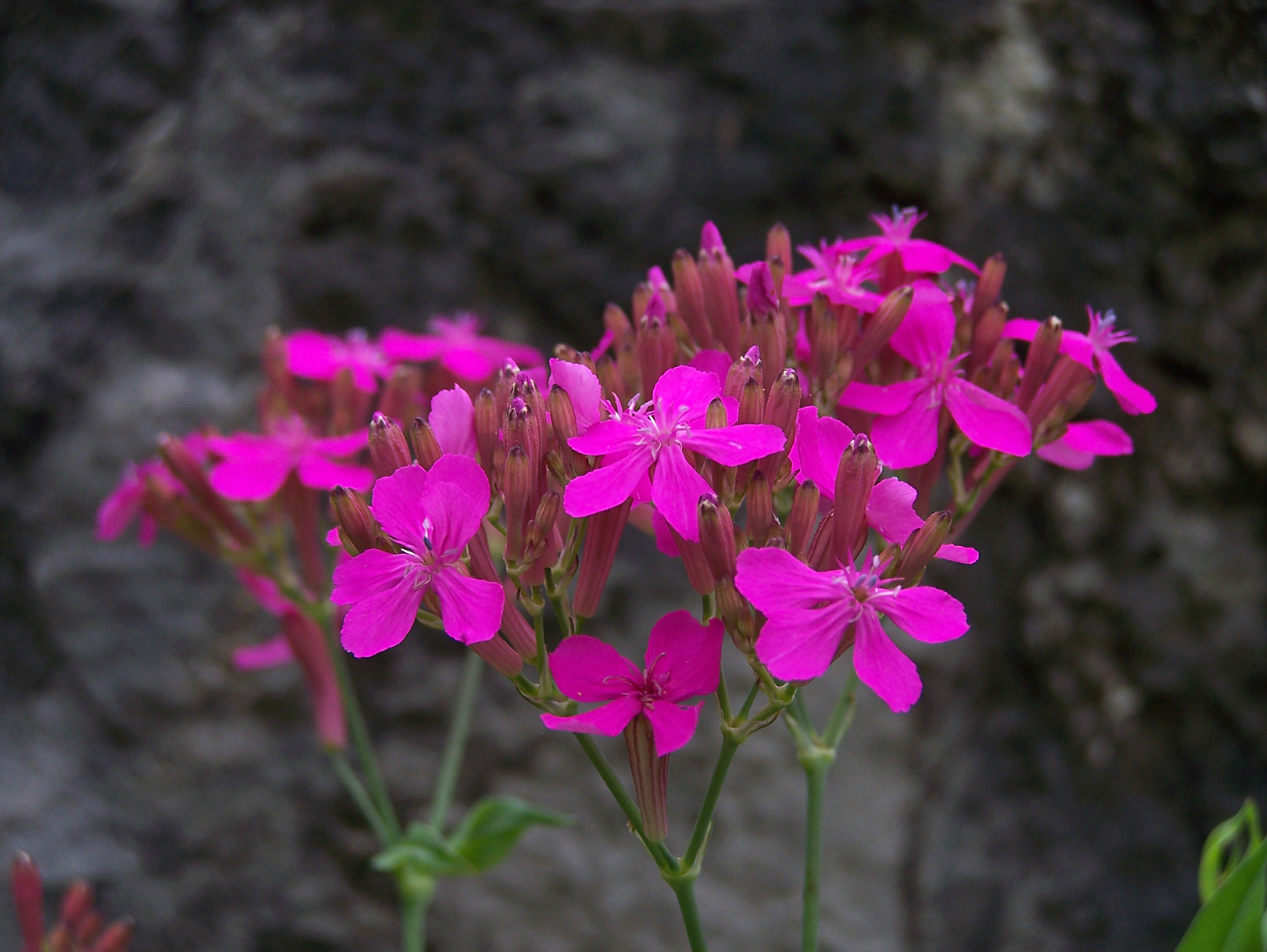 Atocion armeria Common name: Sweet-William Catchfly.